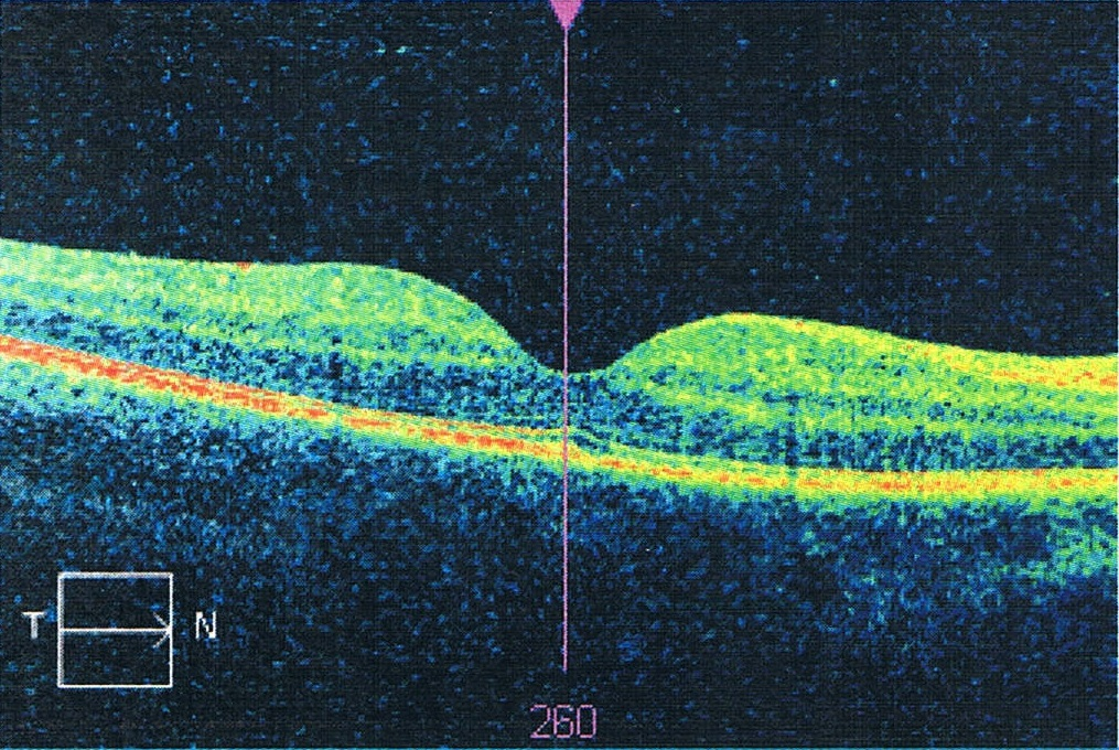 Przekrój przez centralną część siatkówki zdrowego oka, wykonany przy pomocy Optycznej Koherentnej Tomografii (OCT). W centrum widać plamkę żółtą.